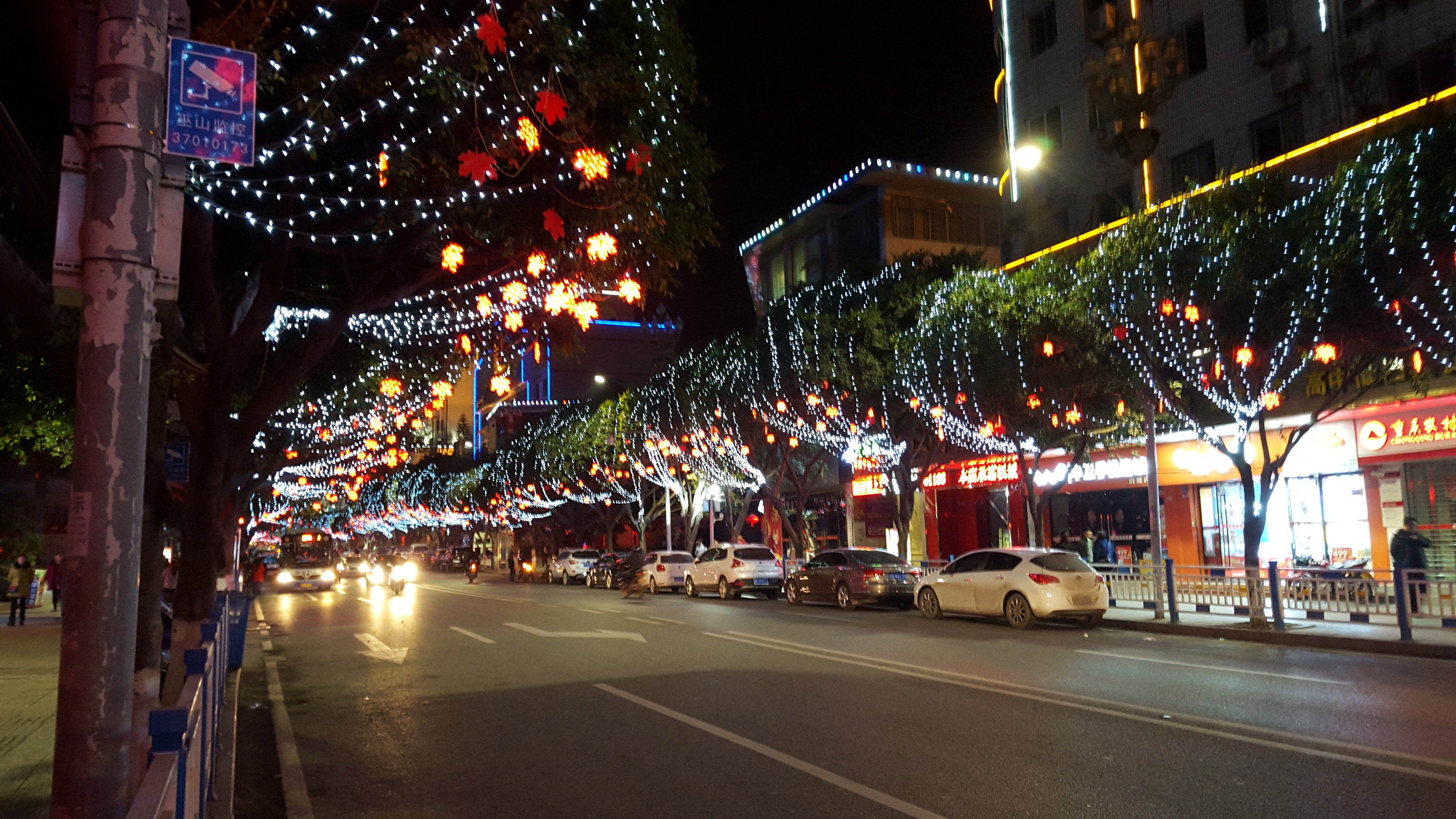 重庆市巫山县广东中路夜景